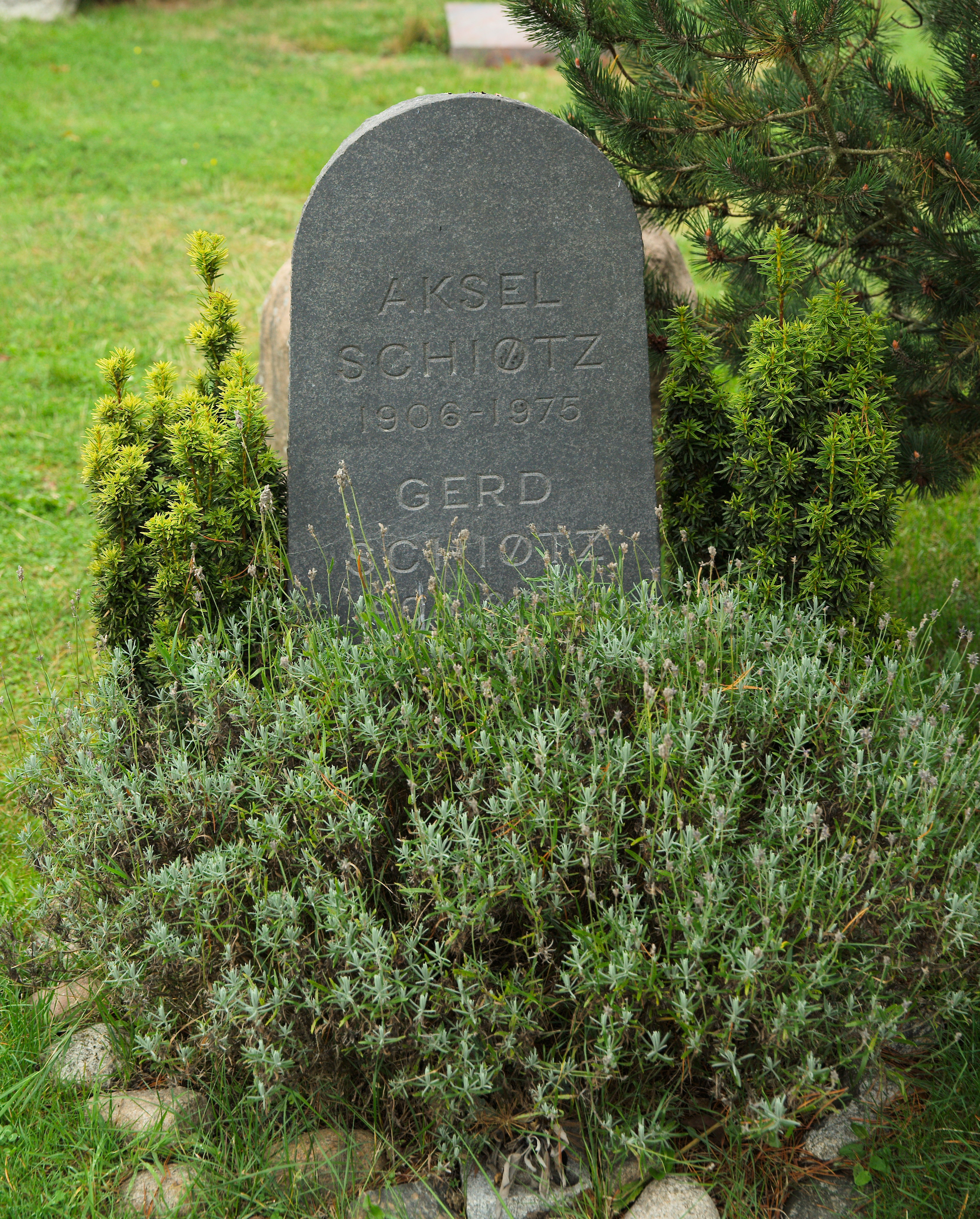 Aksel Schiøtz gravsted